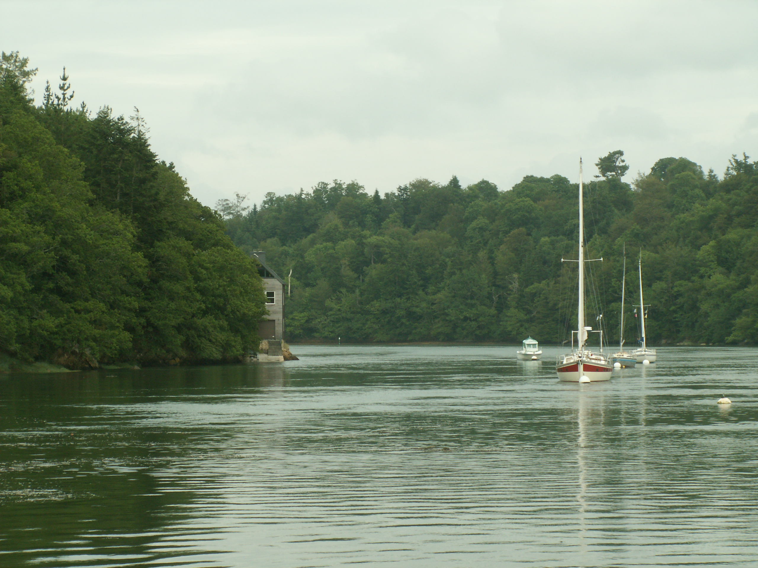 Odet à marée haute